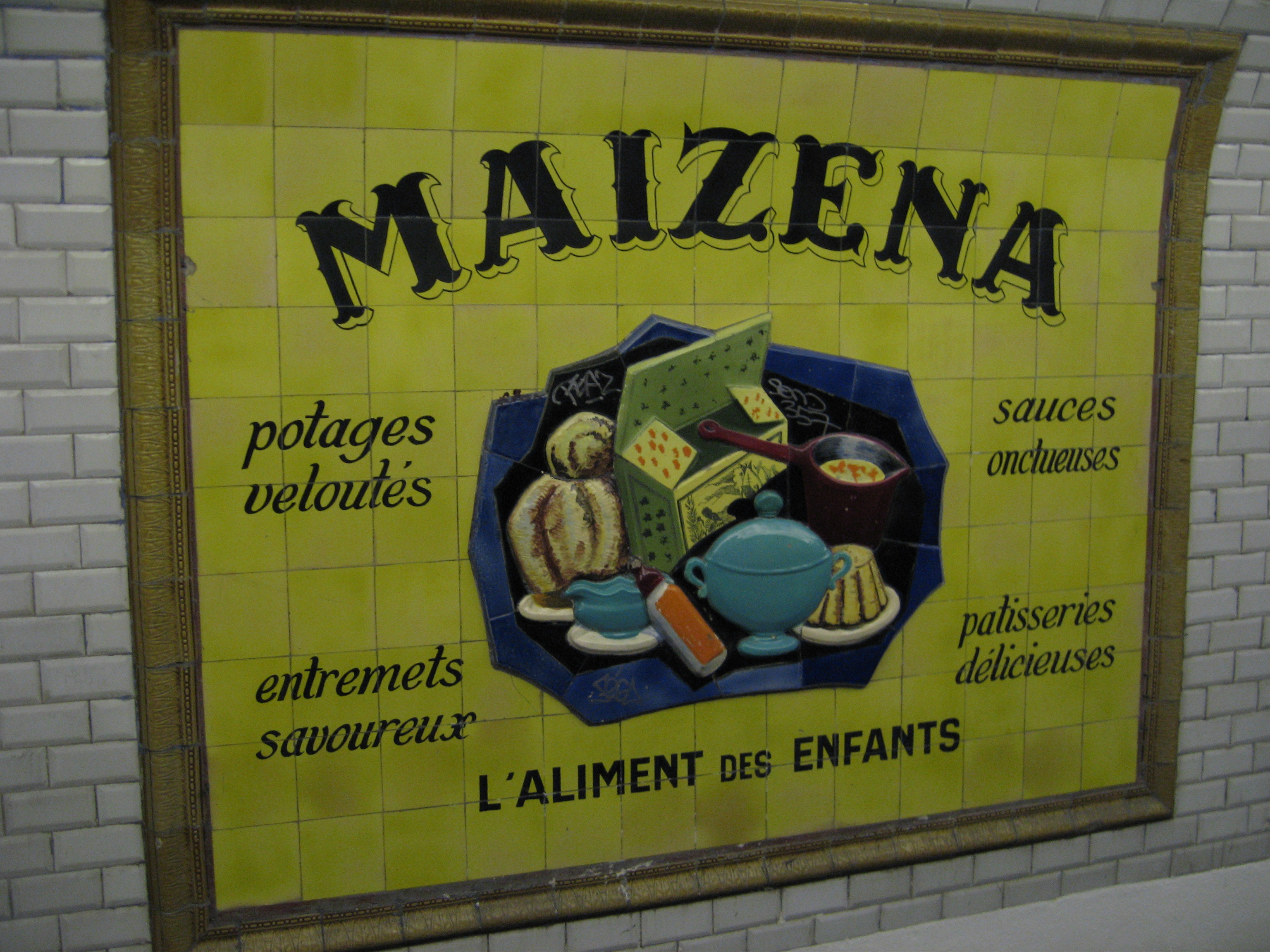 Journées du patrimoine RATP 16-17/09/2006. Publicité Maizena à Saint-Martin.